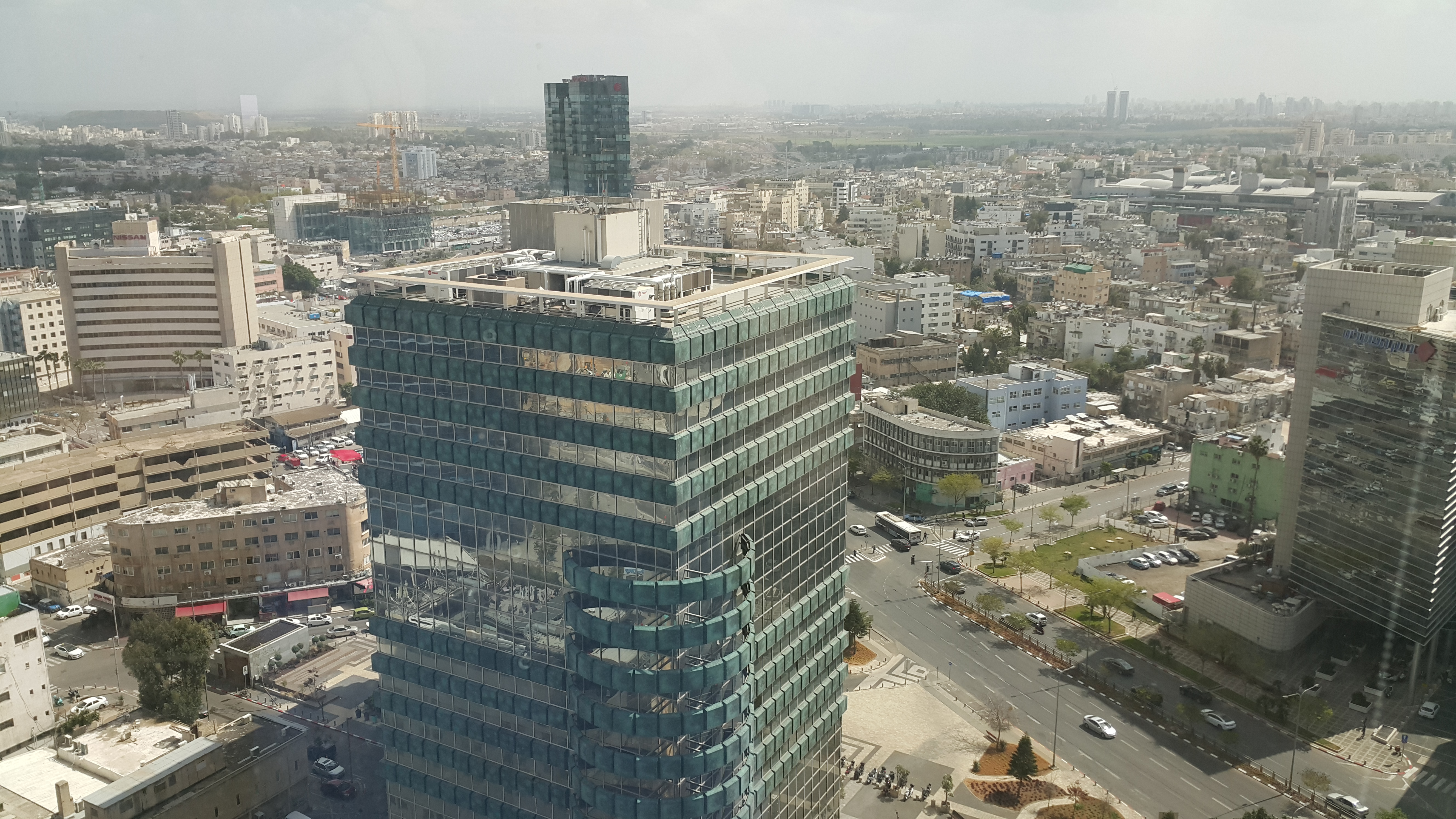 שכונת הרכבת והתקווה בצילום ממגדל לוינשטיין